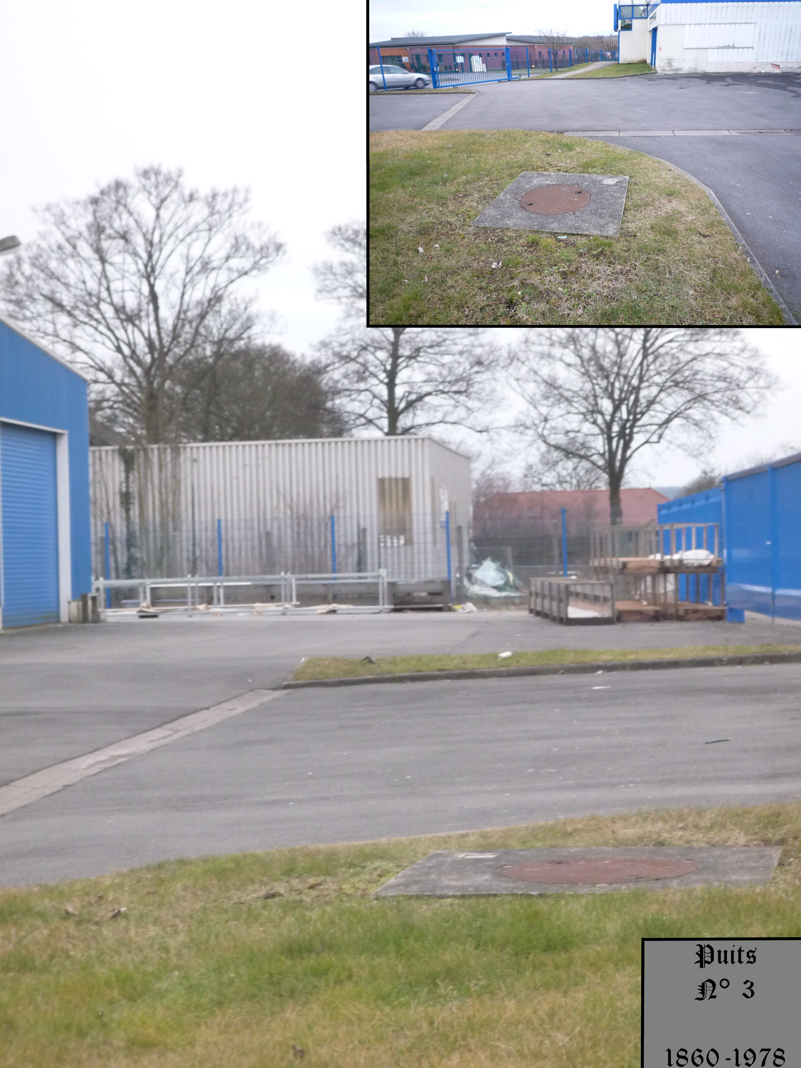 La fosse n° 3 - 3 bis de la Compagnie des mines de Lens était un charbonnage du bassin minier du Nord-Pas-de-Calais constitué de deux puits situé à Liévin, Pas-de-Calais, Nord-Pas-de-Calais, France.